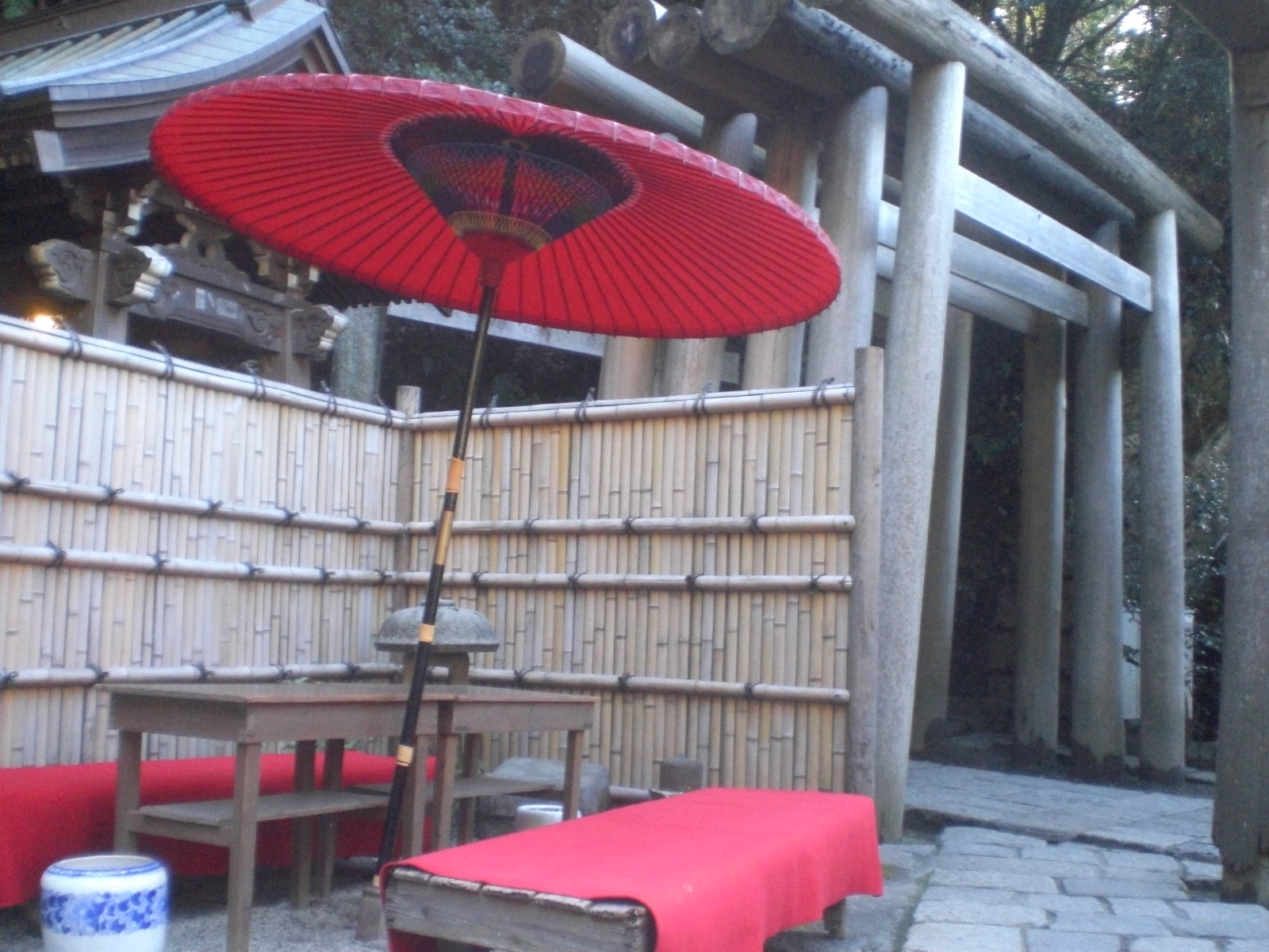 鎌倉・銭洗弁財天の入口(内側)付近です。